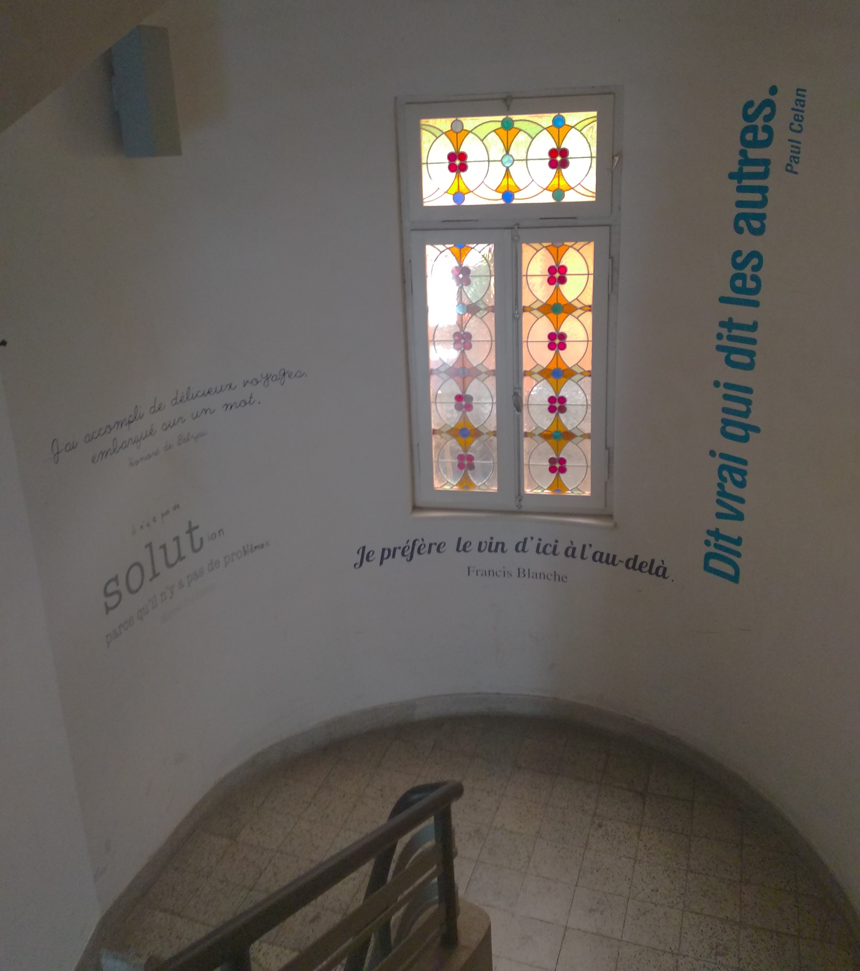 אמרות כנף בחדר המדרגות של המכון הצרפתי בתל אביב